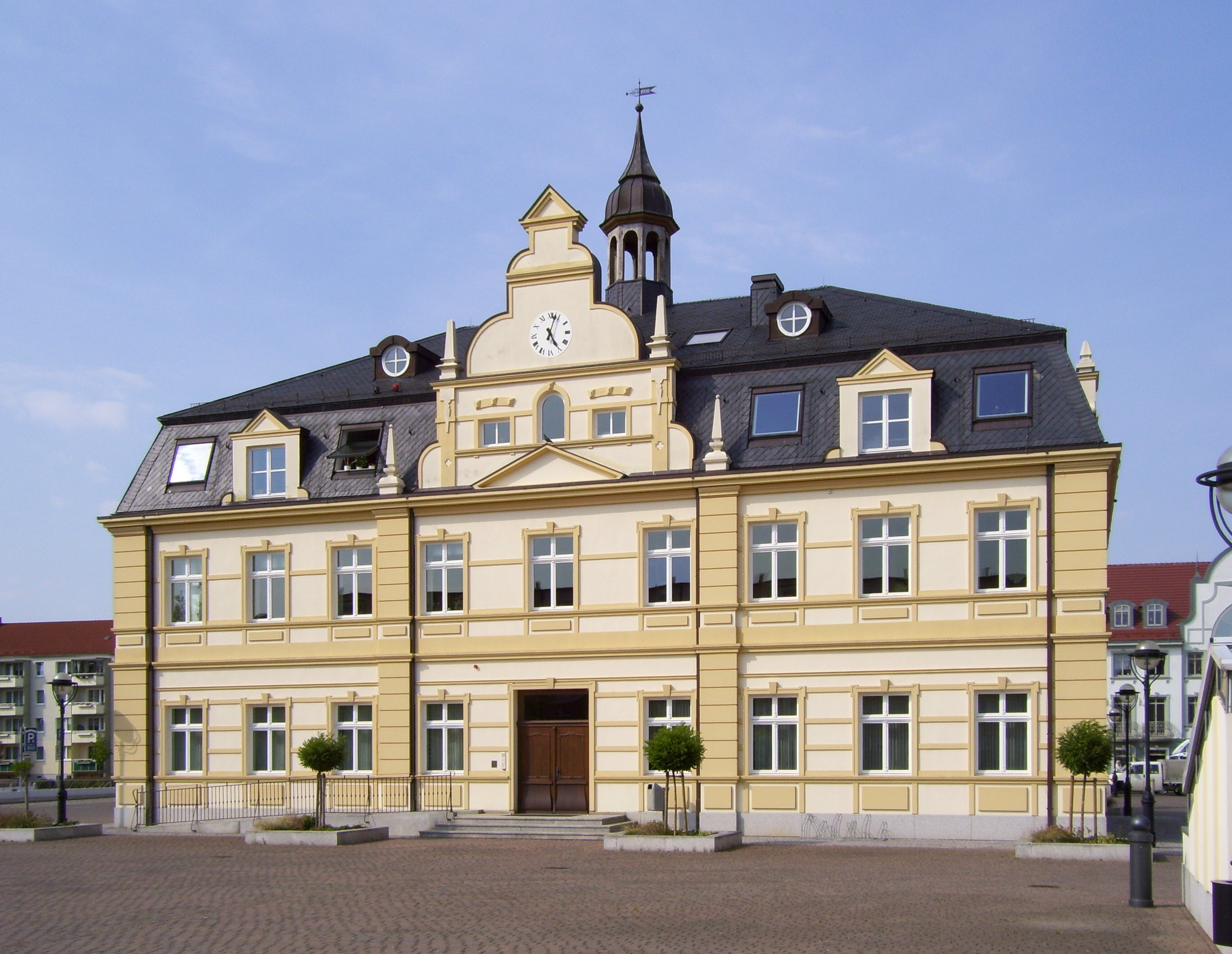 Rathaus Demmin (Mecklenburg-Vorpommern) - Ansicht von Süden